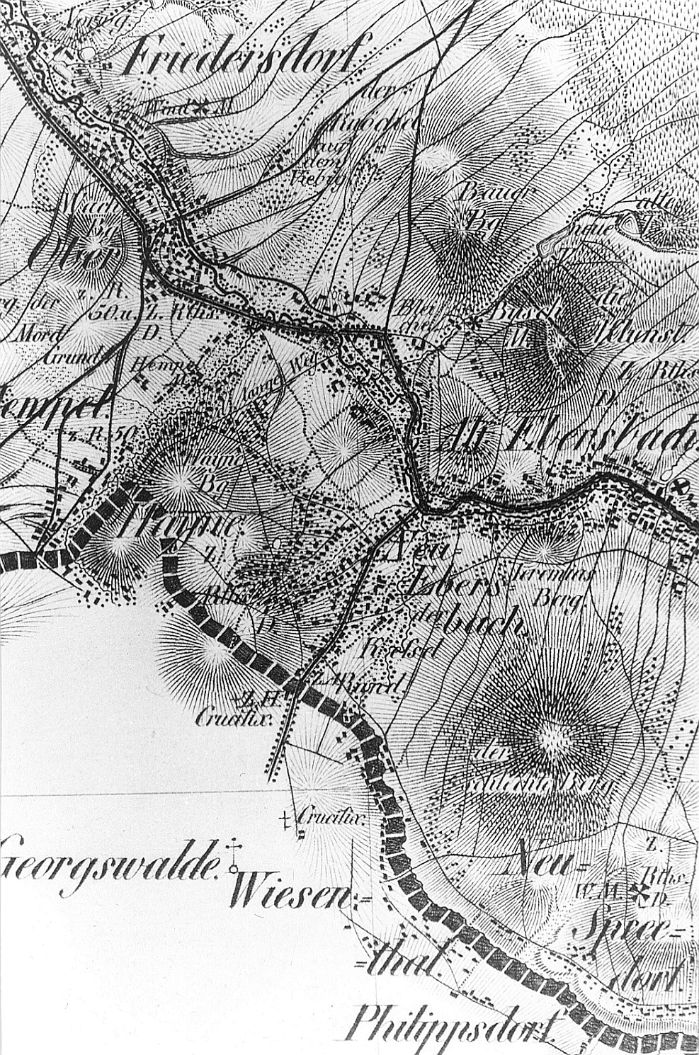 Original image description from the Deutsche Fotothek Ebersbach/Sachsen. Oberreit, Sect. Stolpen, 1821/22